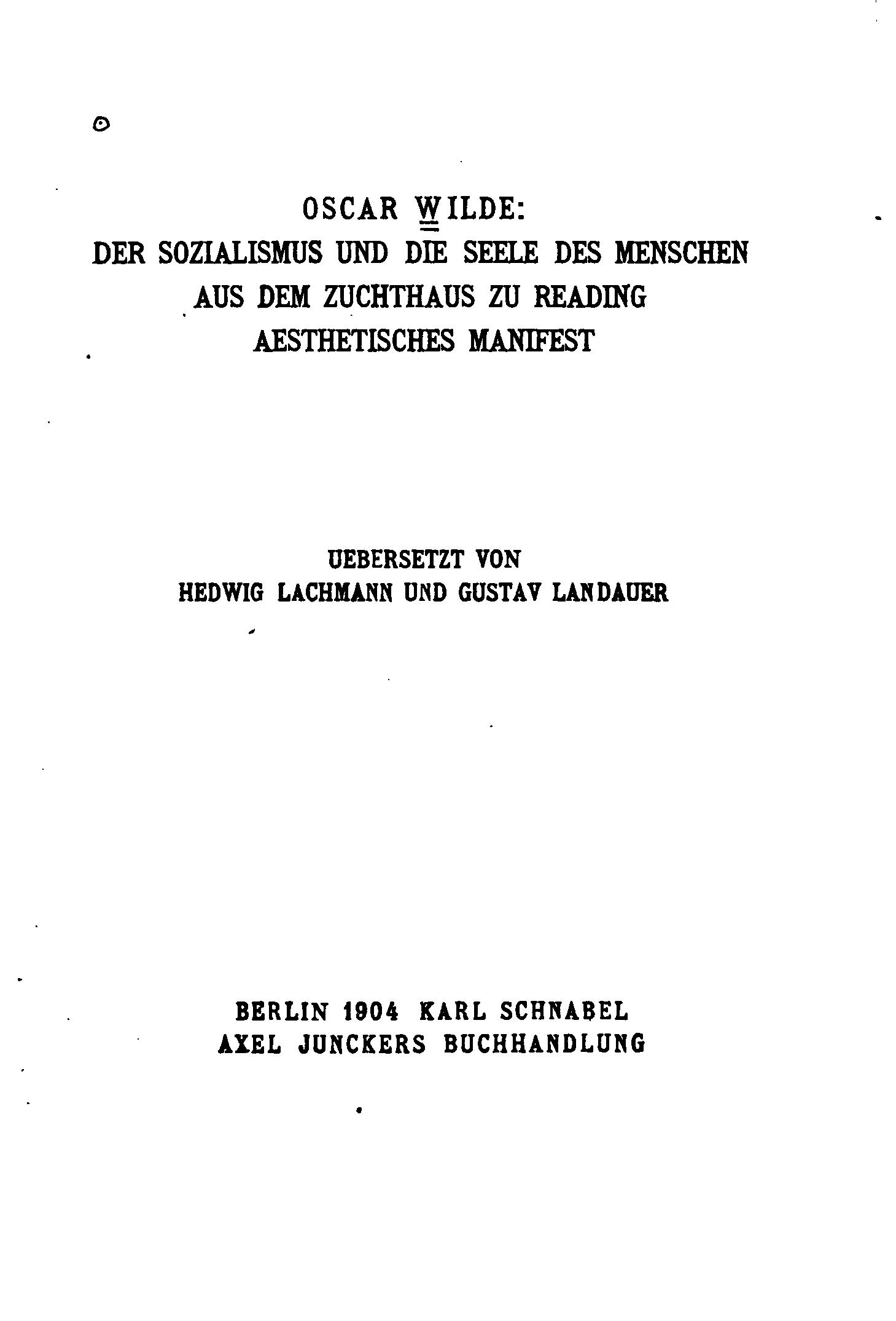 Oscar Wilde: Drei Essays. Deutsch von Hedwig Lachmann und Gustav Landauer